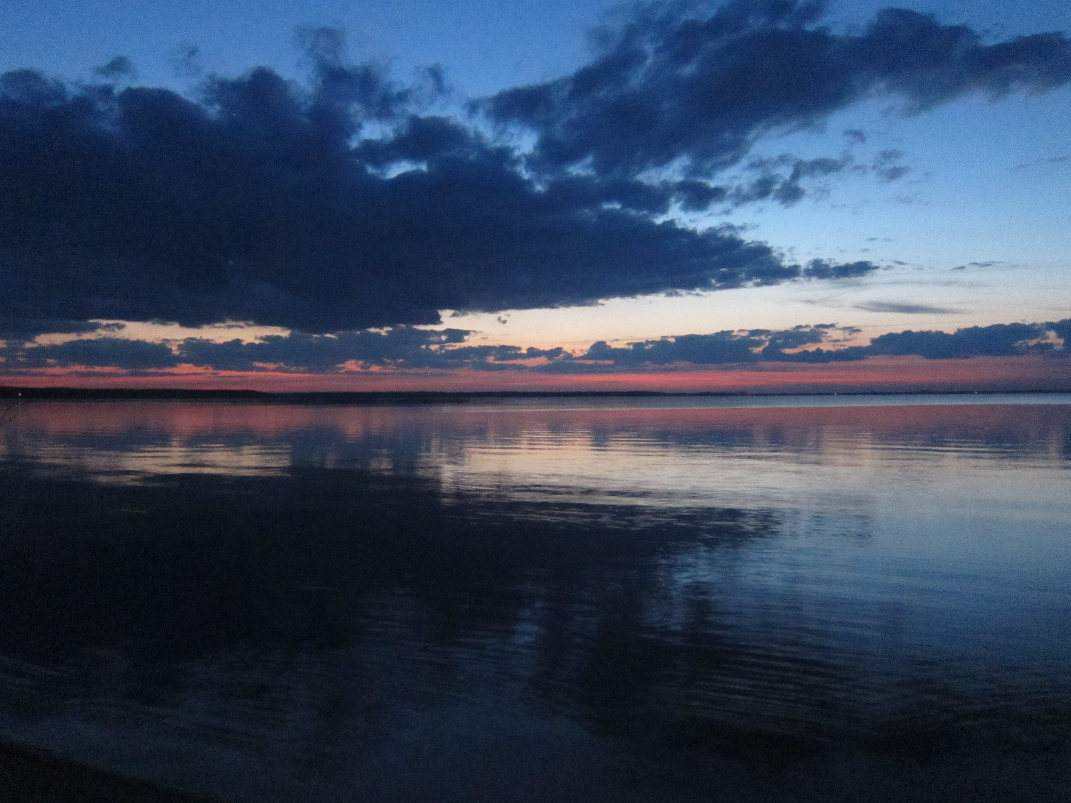 Озеро Світязь, Шацький національний природний парк, Шацький національний природний парк, ДП «Шацький учбово-досвідний лісгосп»